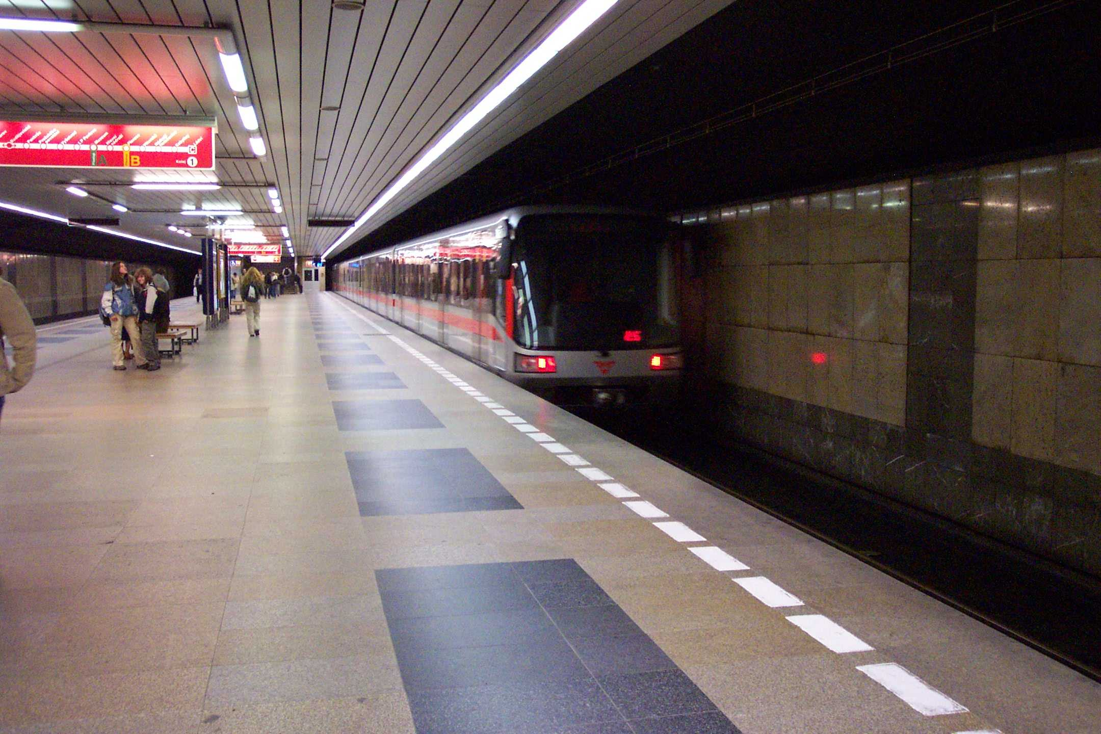 Metro station Budějovická in Prague (train leaving)- stanice metra Budějovická v Praze (odjíždějící vlak)